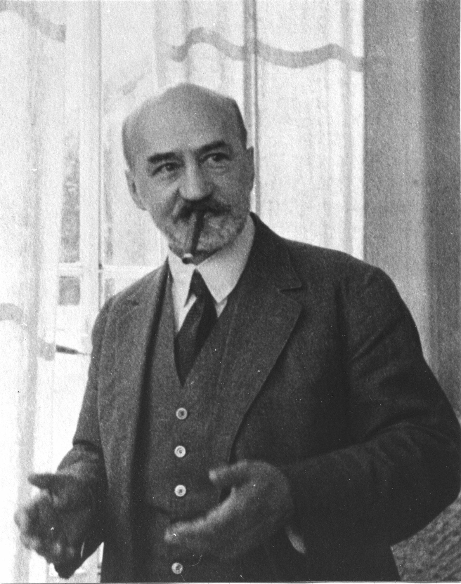 Monsieur André Homberg